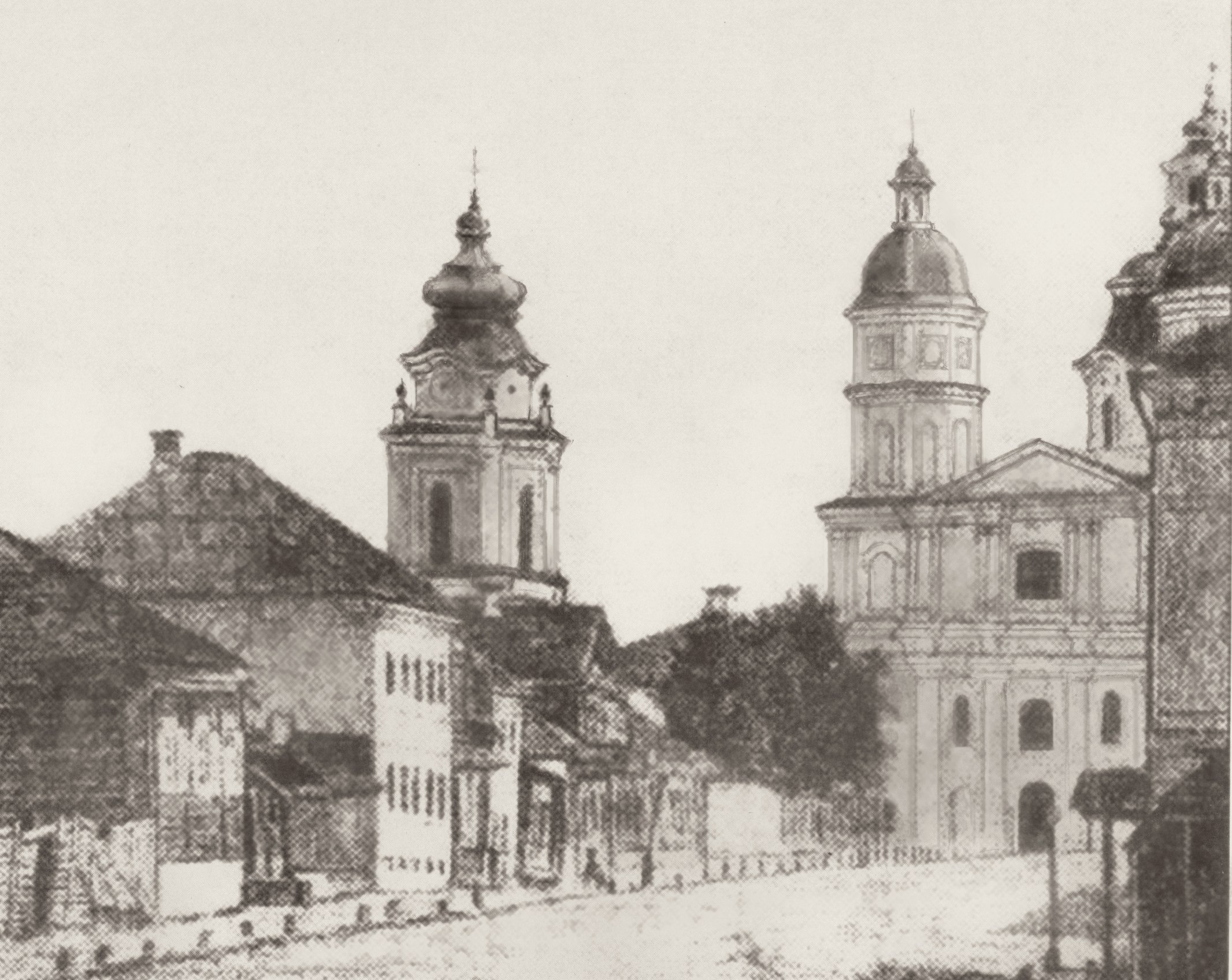 Беларуская (тарашкевіца): Віцебск (Viciebsk), вуліца Замкавая (vulica Zamkavaja) каля скрыжаваньня зь Вялікай (vulica Vialikaja). Касьцёл Сьвятога Язэпа і калегіюм езуітаў